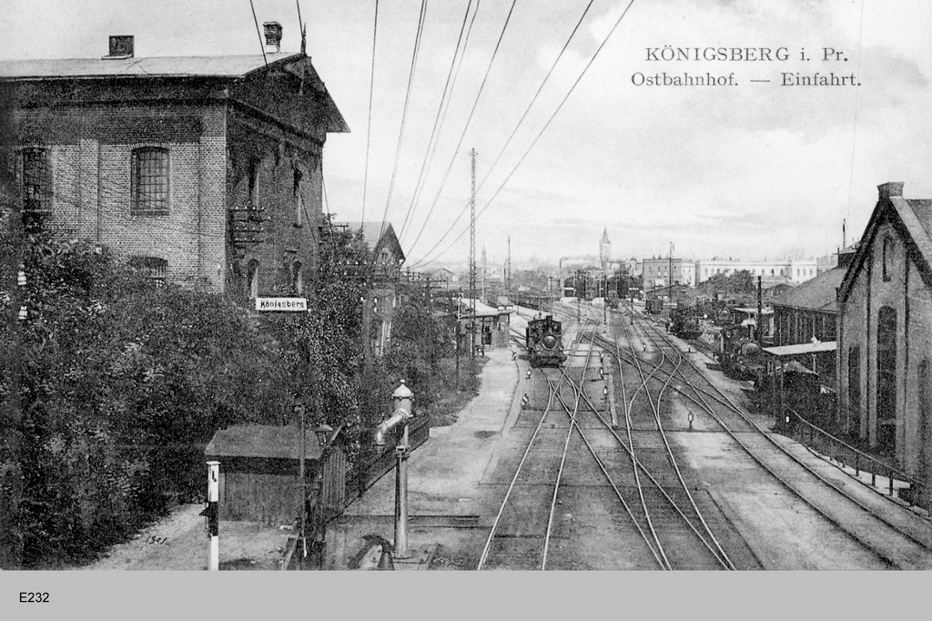 Königsberg